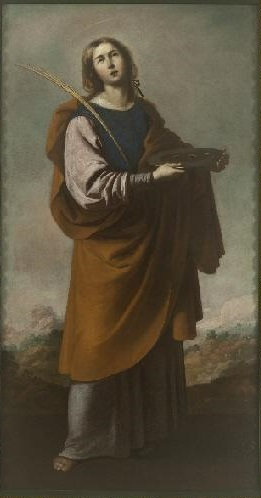 La obra representa a la virgen y mártir Santa Lucía, que murió por profesar el cristianismo.